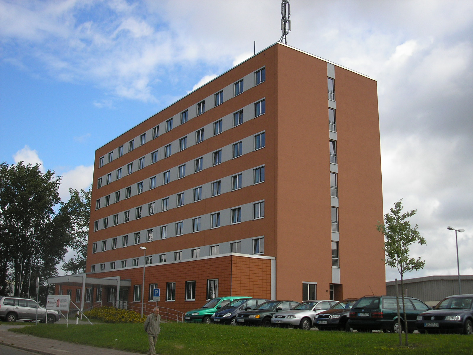 Das Straßenbauamt Nordthüringen in Leinefelde (Thüringen) im ehemaligen Bürogebäude der Baumwollspinnerei.